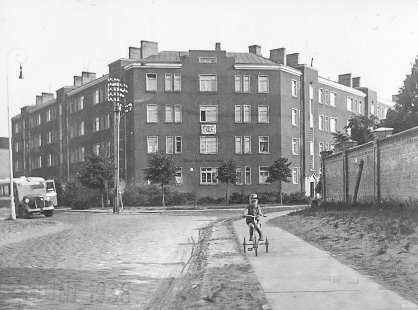 Dzīvojamā ēka, Rīga, Lomonosova iela 2